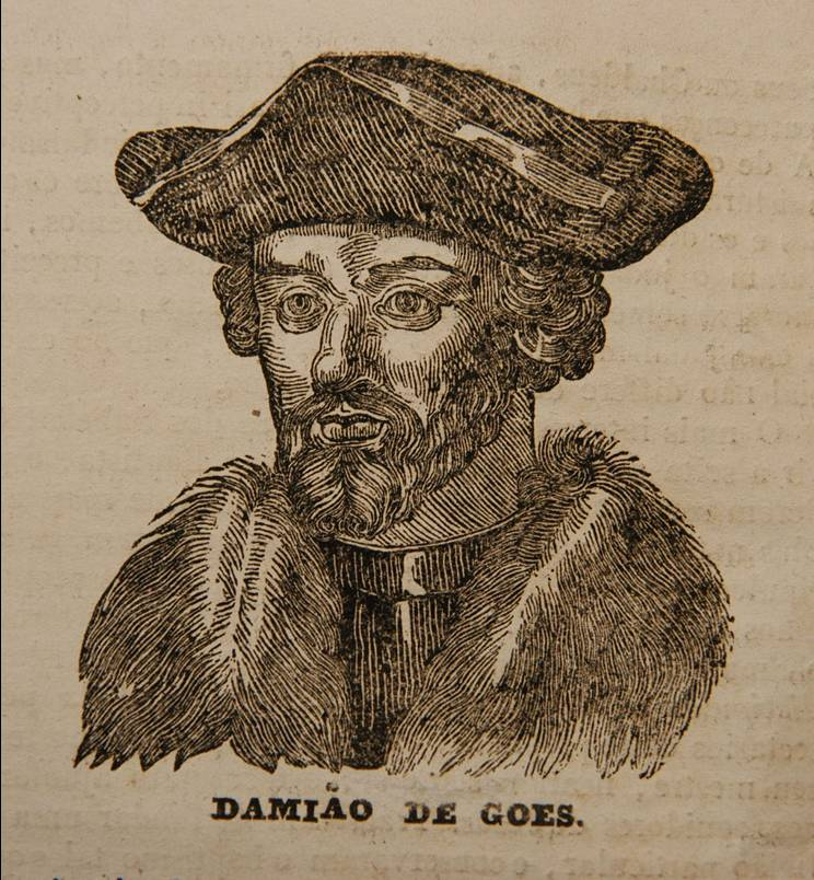 "Woodcut print" - Damião de Góis